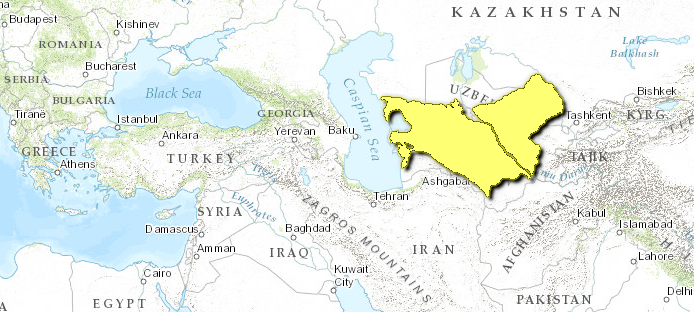 Mappa Ecoregione PA1312 - Deserto dell'Asia centrale meridionale